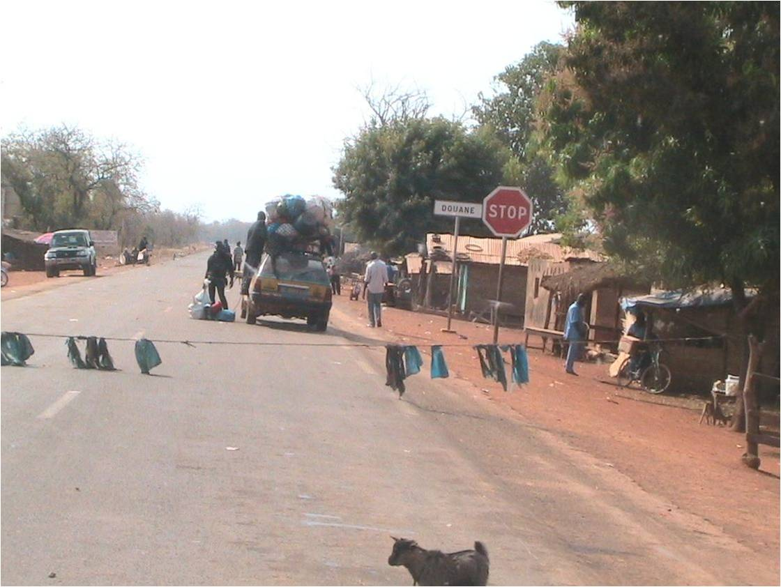 Koundara.Frontiera della Guinea arrivando dal Senegal.